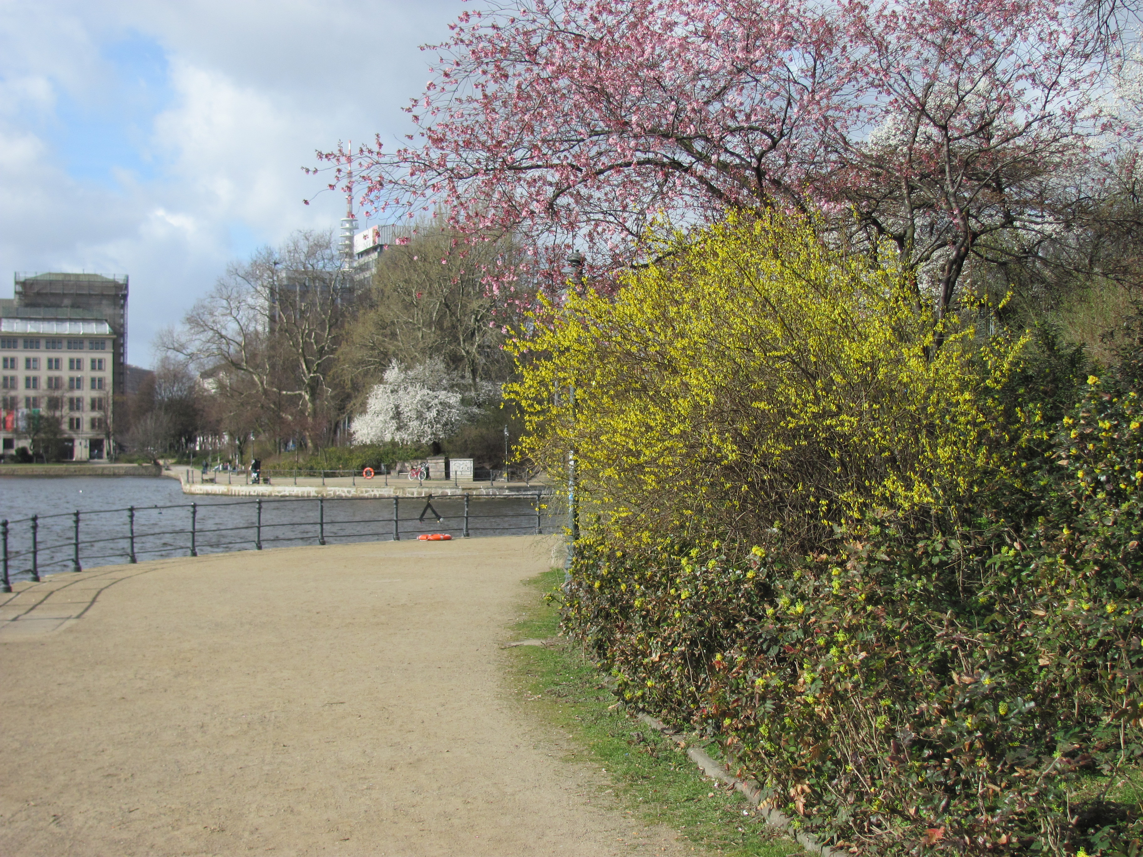 Forsythien an der Binnenalster in Hamburg